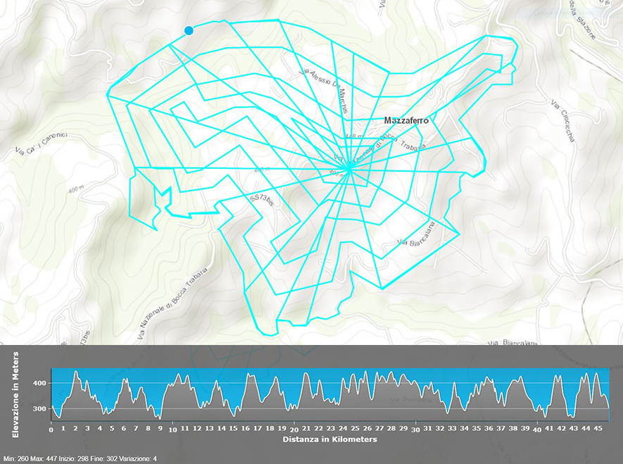 Mappatura altimetrica del quartiere Mazzaferro (Urbino) eseguita con sistema ArcGIS